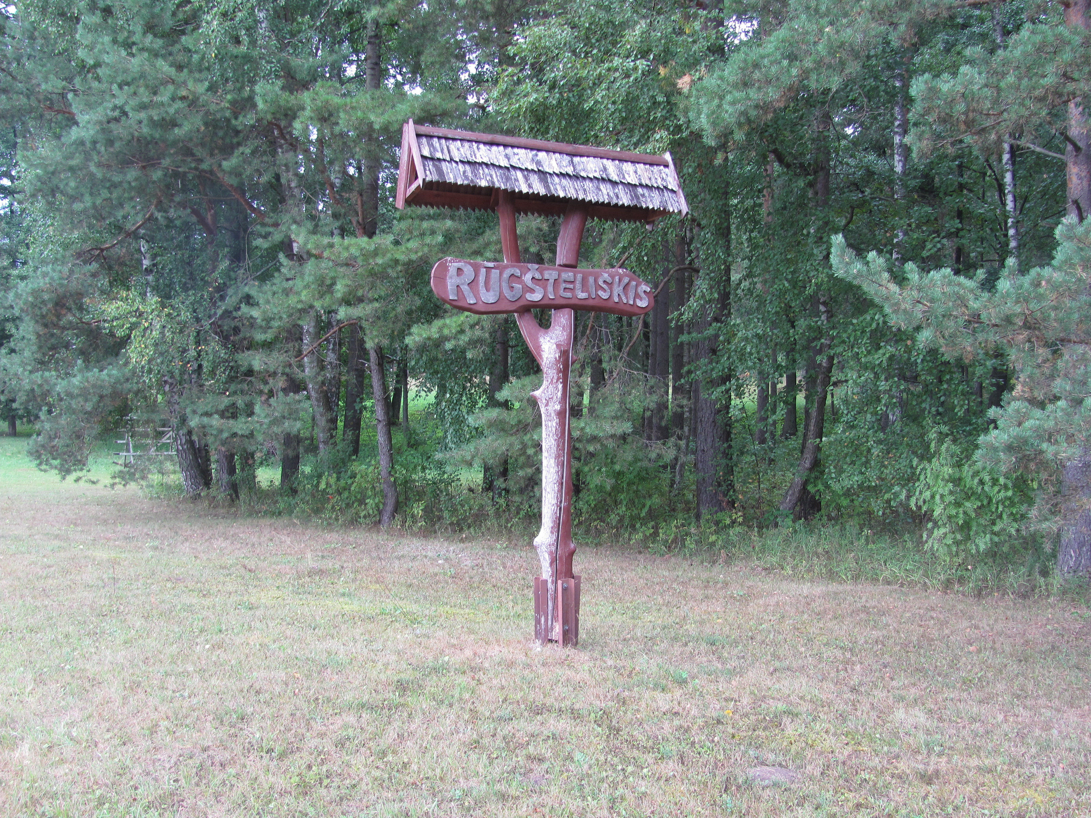 Rūgšteliškis 28303, Lithuania